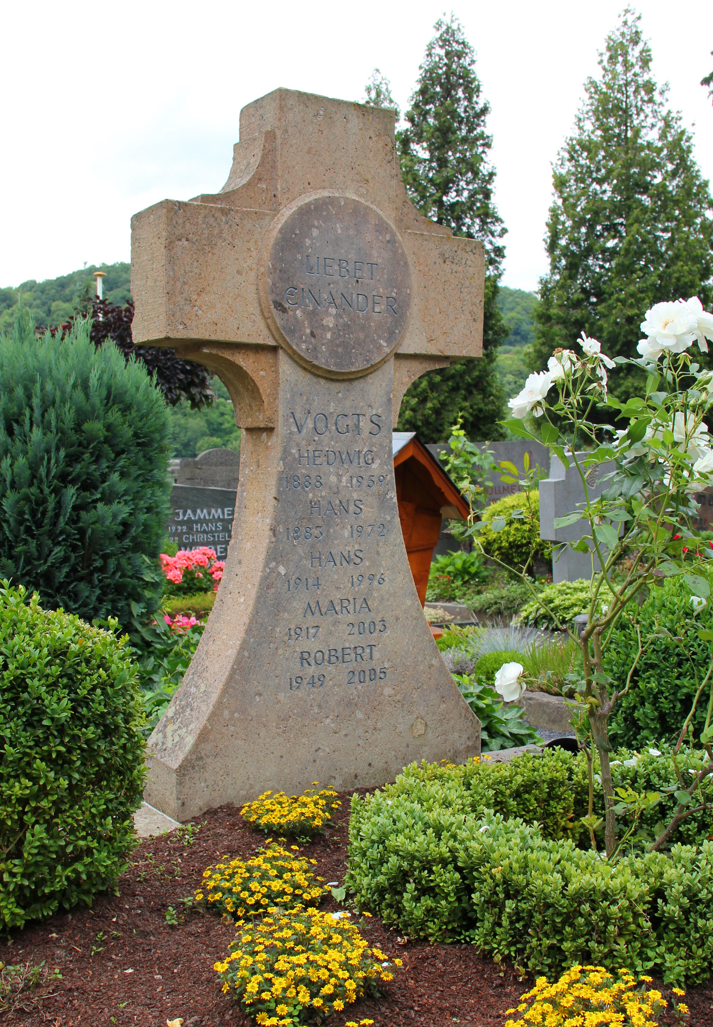 Hans Vogts, Familiengrab auf dem katholischen Friedhof an der Pfarrkirche St. Pantaleon in Unkel am Rhein